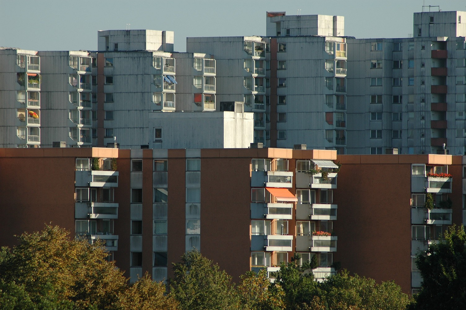 Bildbeschreibung: Hochhäuser in Neuperlach, München Quelle: Nikon D70 Fotograf: TobiWanKenobi TobiWanKenobi Datum: 5.10.2004